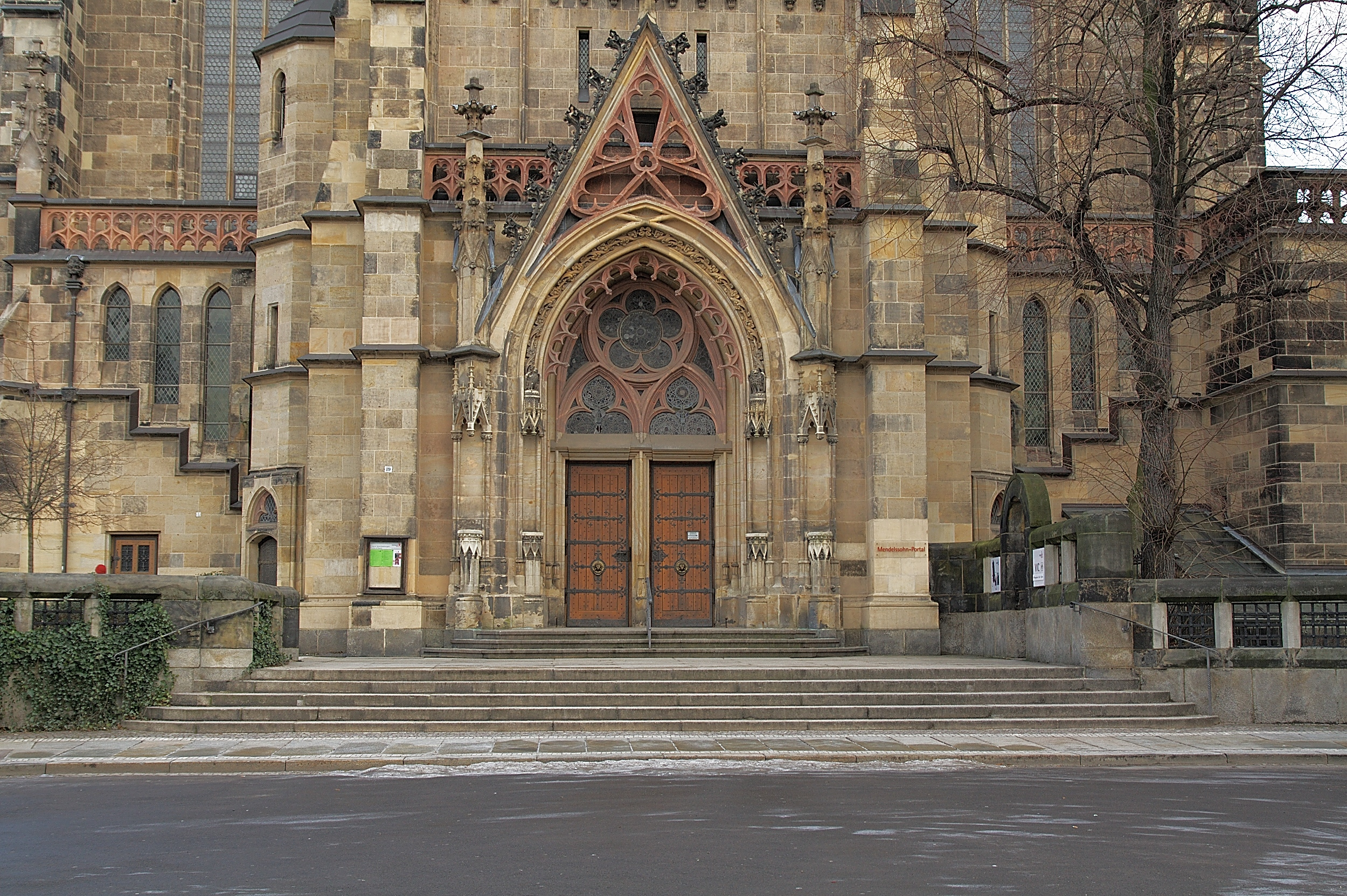 Das Mendelssohn-Portal der Thomaskirche in Leipzig.